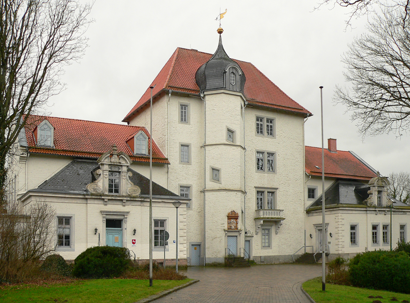 Burg Sehusa Vorderseite mit Treppenturm